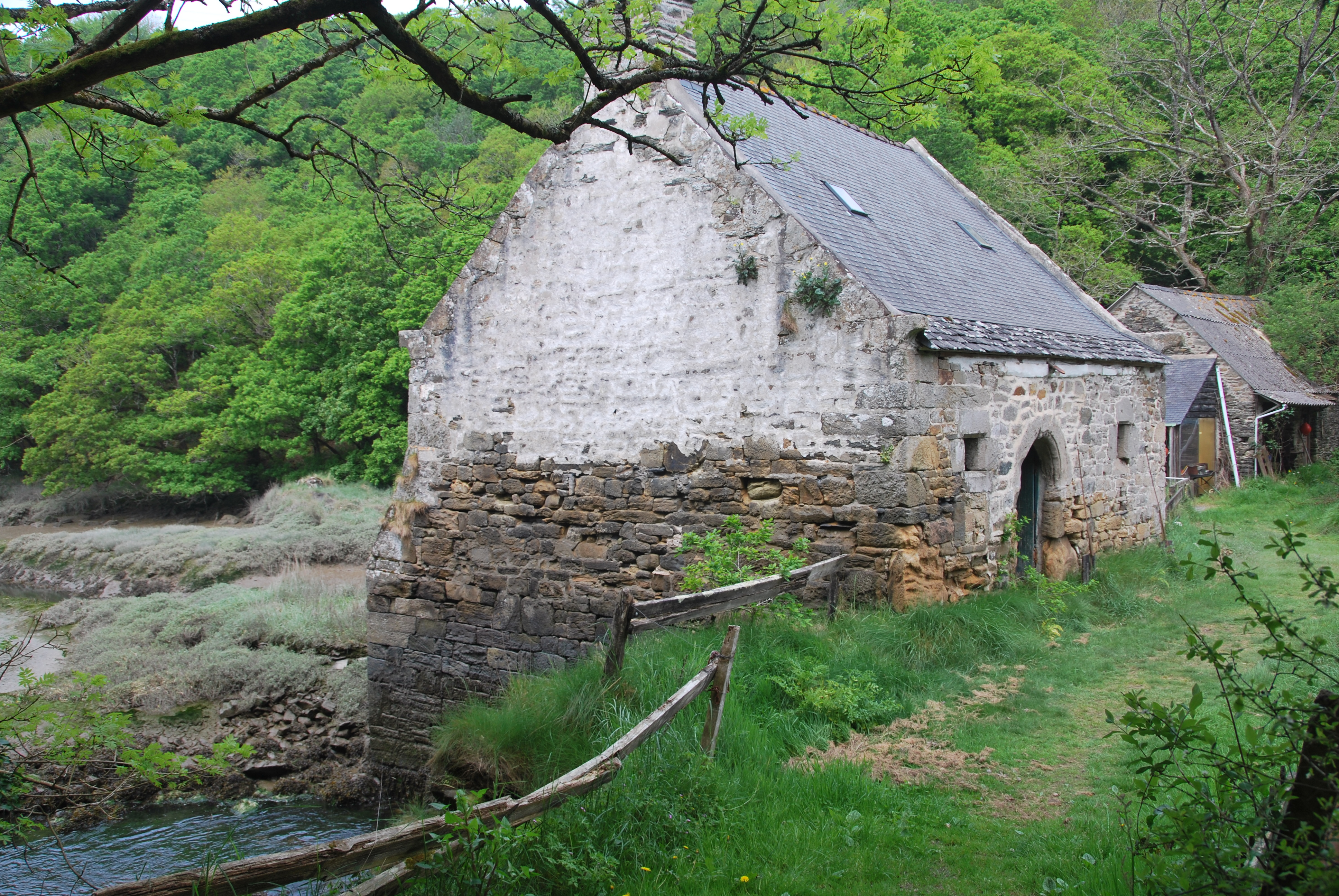 Milin Vor de Dourduff en Terre